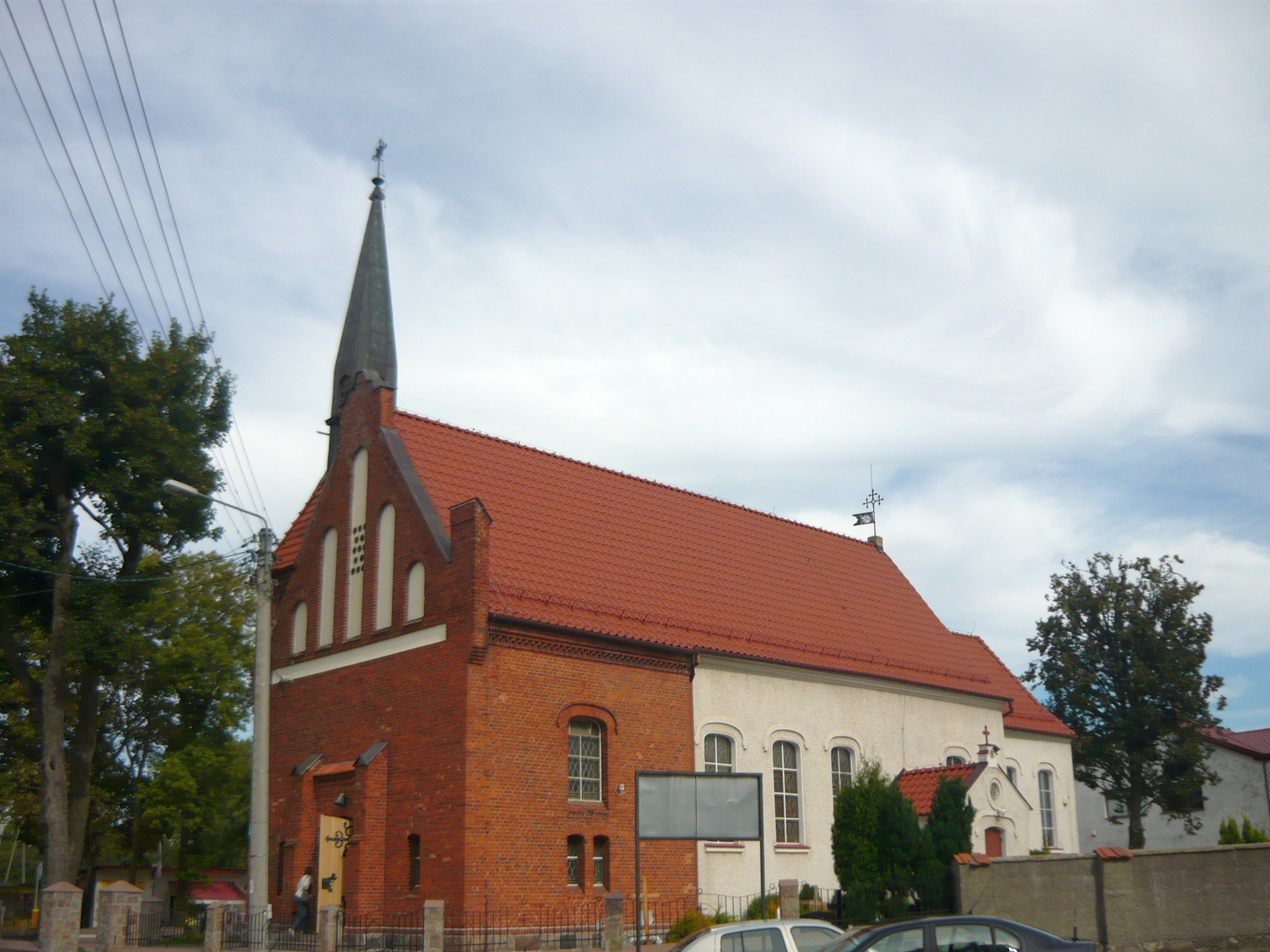 Kościół św. Apostołów Szymona i Judy Tadeusza oraz św. Marii Magdaleny w Chwaszczynie.